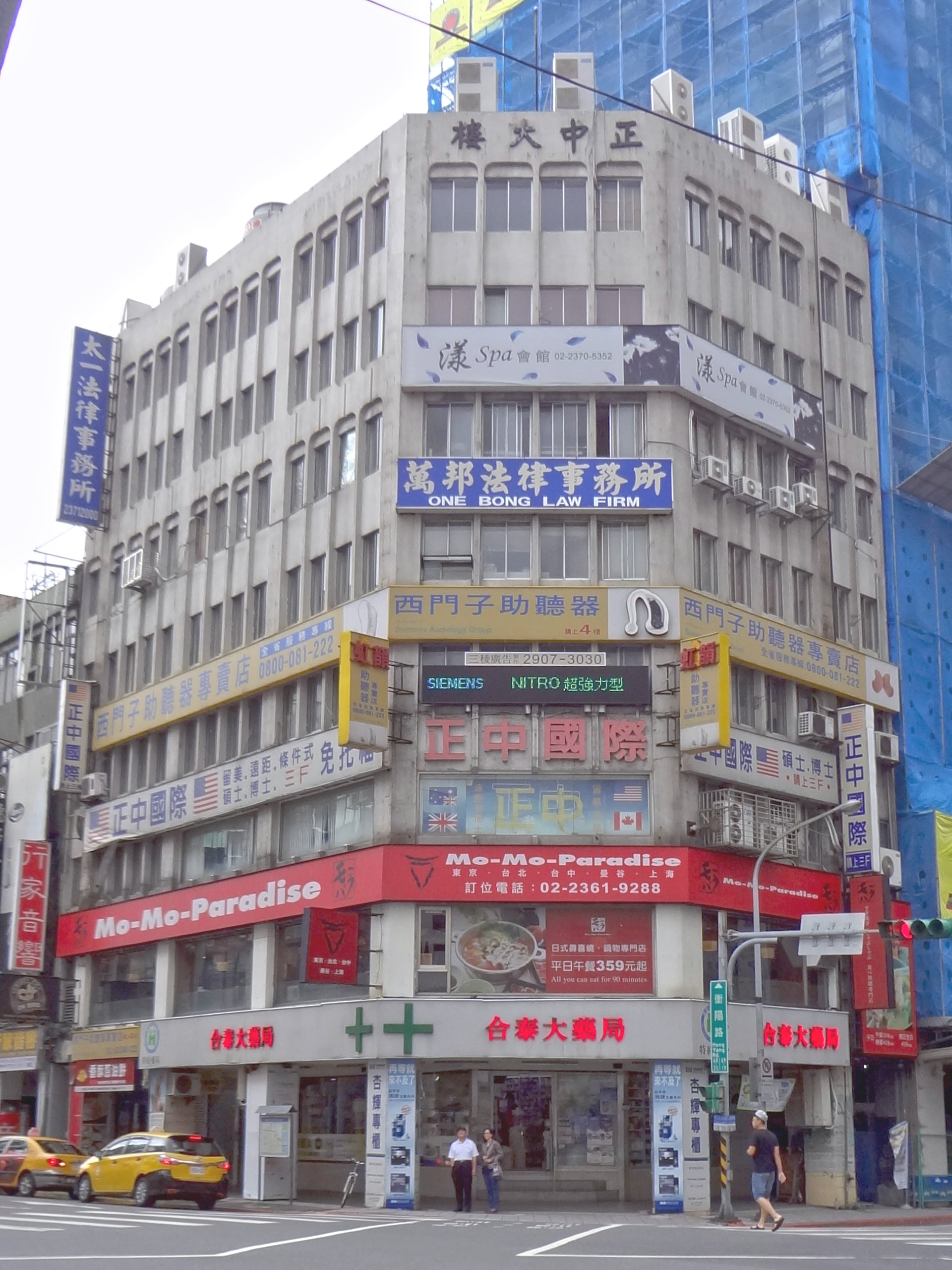 正中大樓，原正中書局總部。